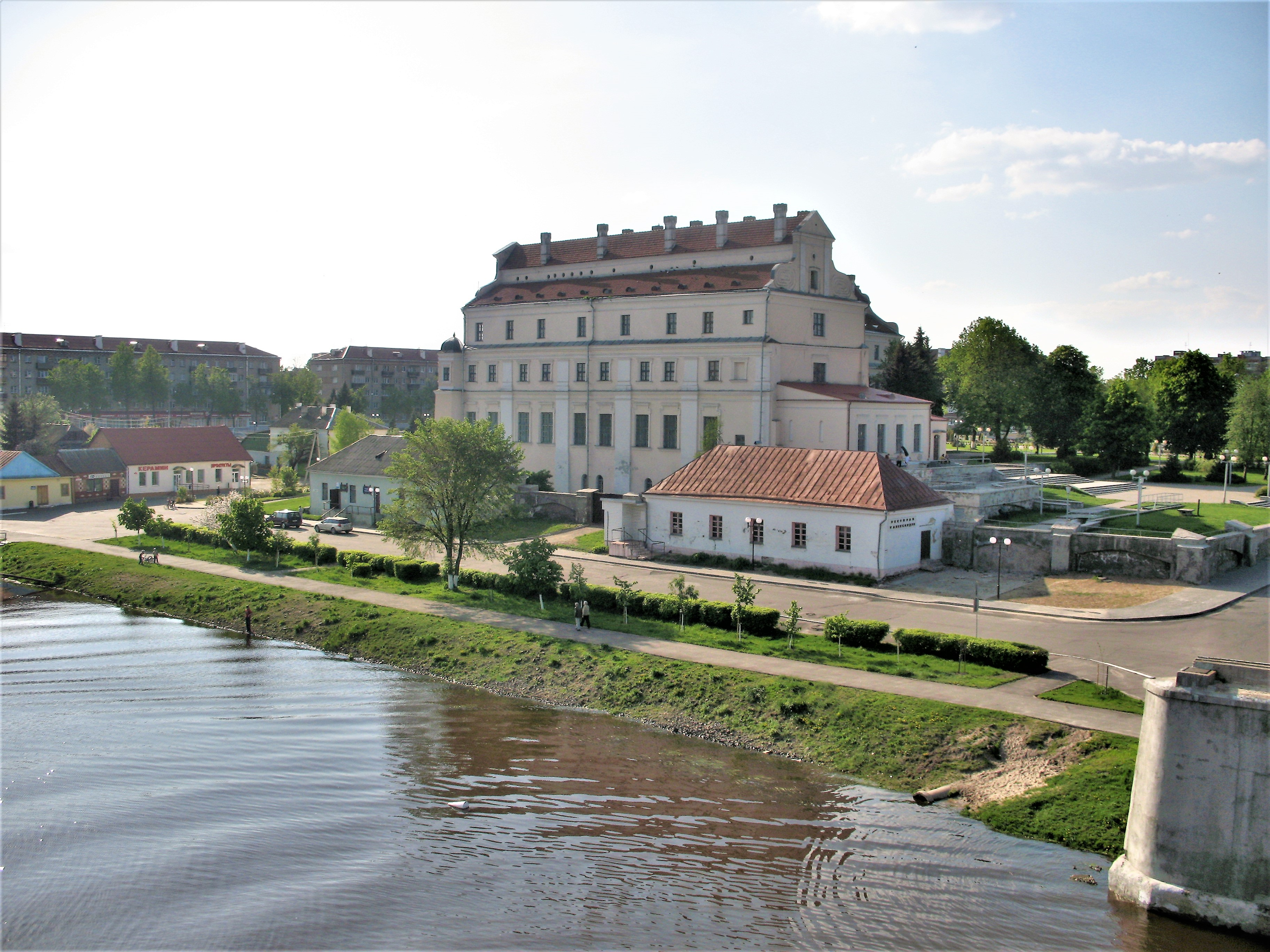 Pinsk, Jesuit collegium